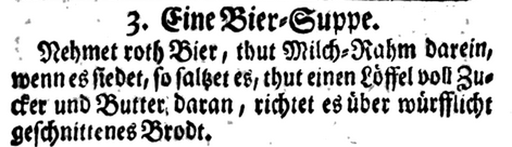 Snippet from Das neueste und wohl-eingerichtete Koch-Buch: In welchem zu finden, Wie man nicht alleine allerley gute, delicate und wohlschmeckende Speisen ... bereiten und zu Tisch tragen, Sondern auch allerhand Früchte einmachen ... könne. Niedt, 1724